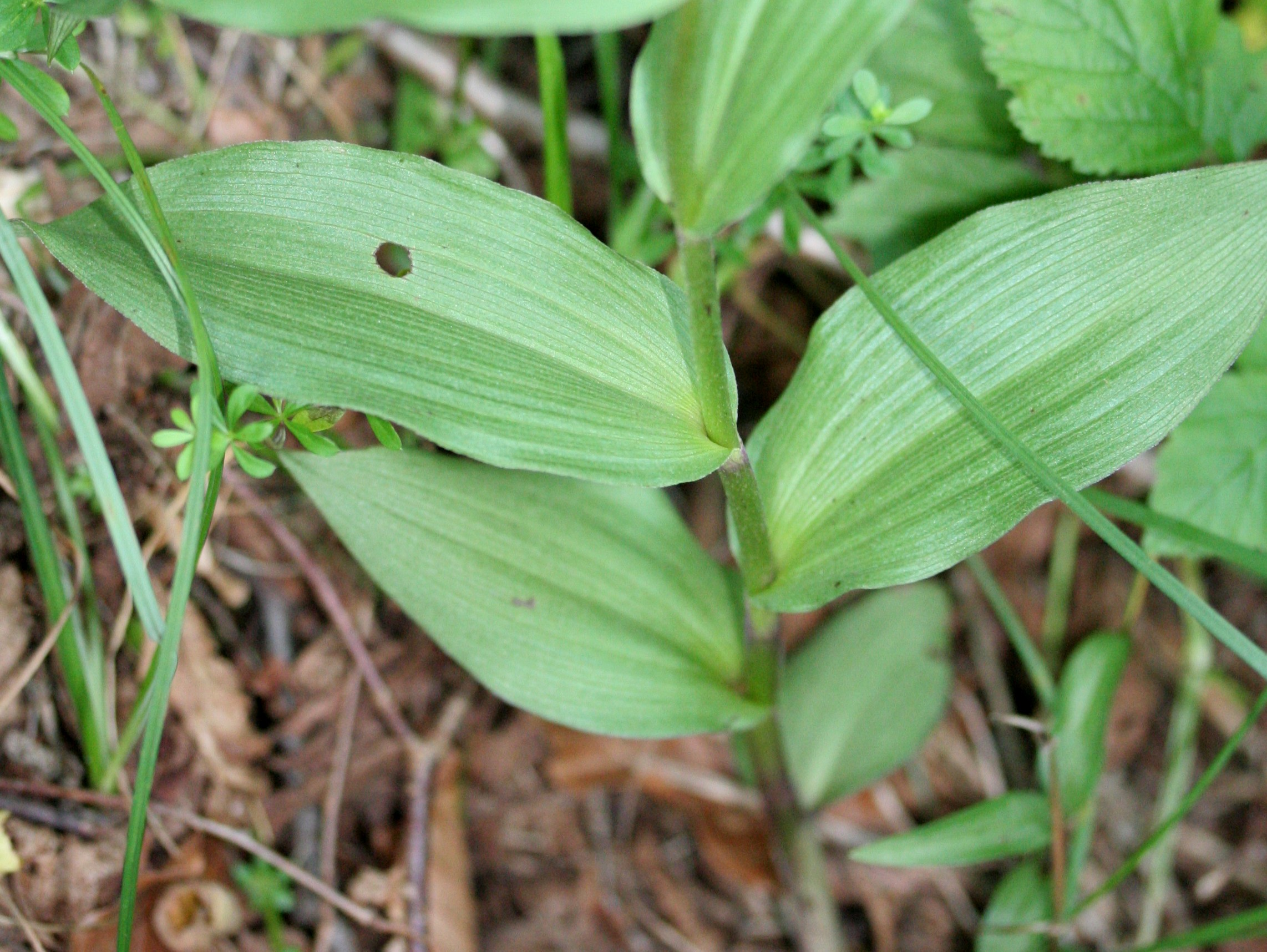 Epipactis_atrorubens (Elleborina violacea) Località : Pranolz, Trichiana (BL), 733 m s.l.m.